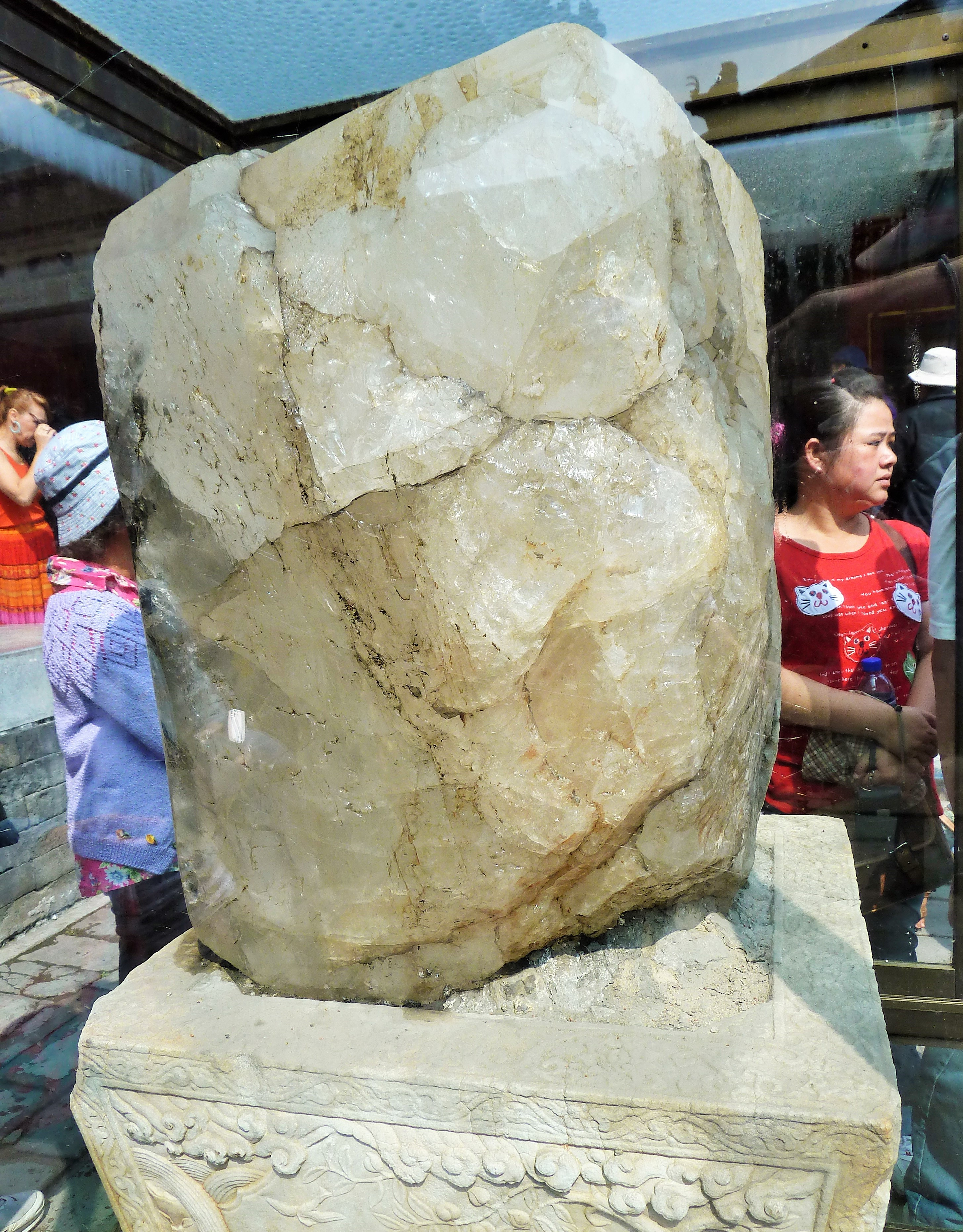 Dans la Cité_interdite, à Pékin .- ,Chine